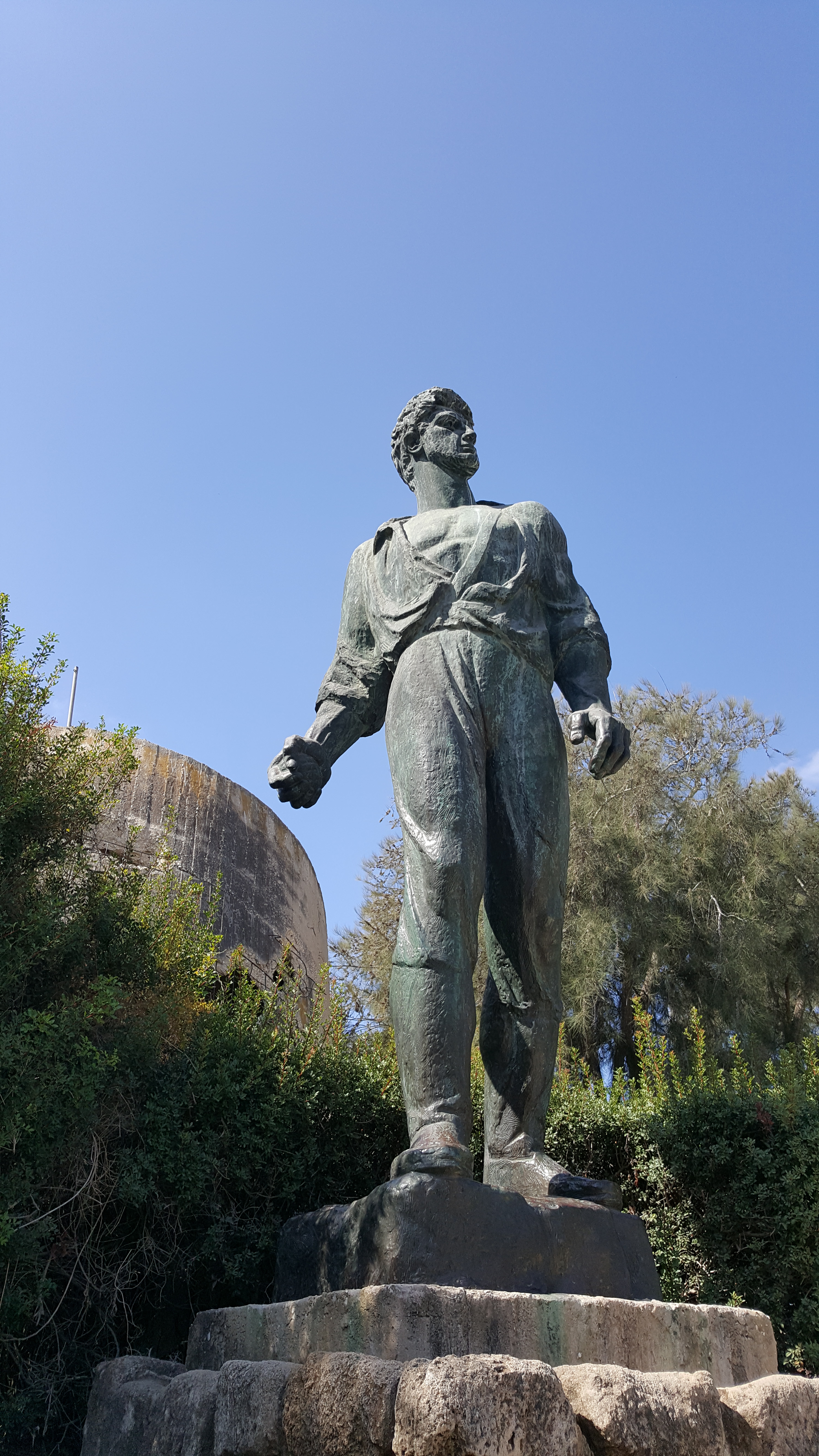 מגדל המים בקיבוץ יד מרדכי